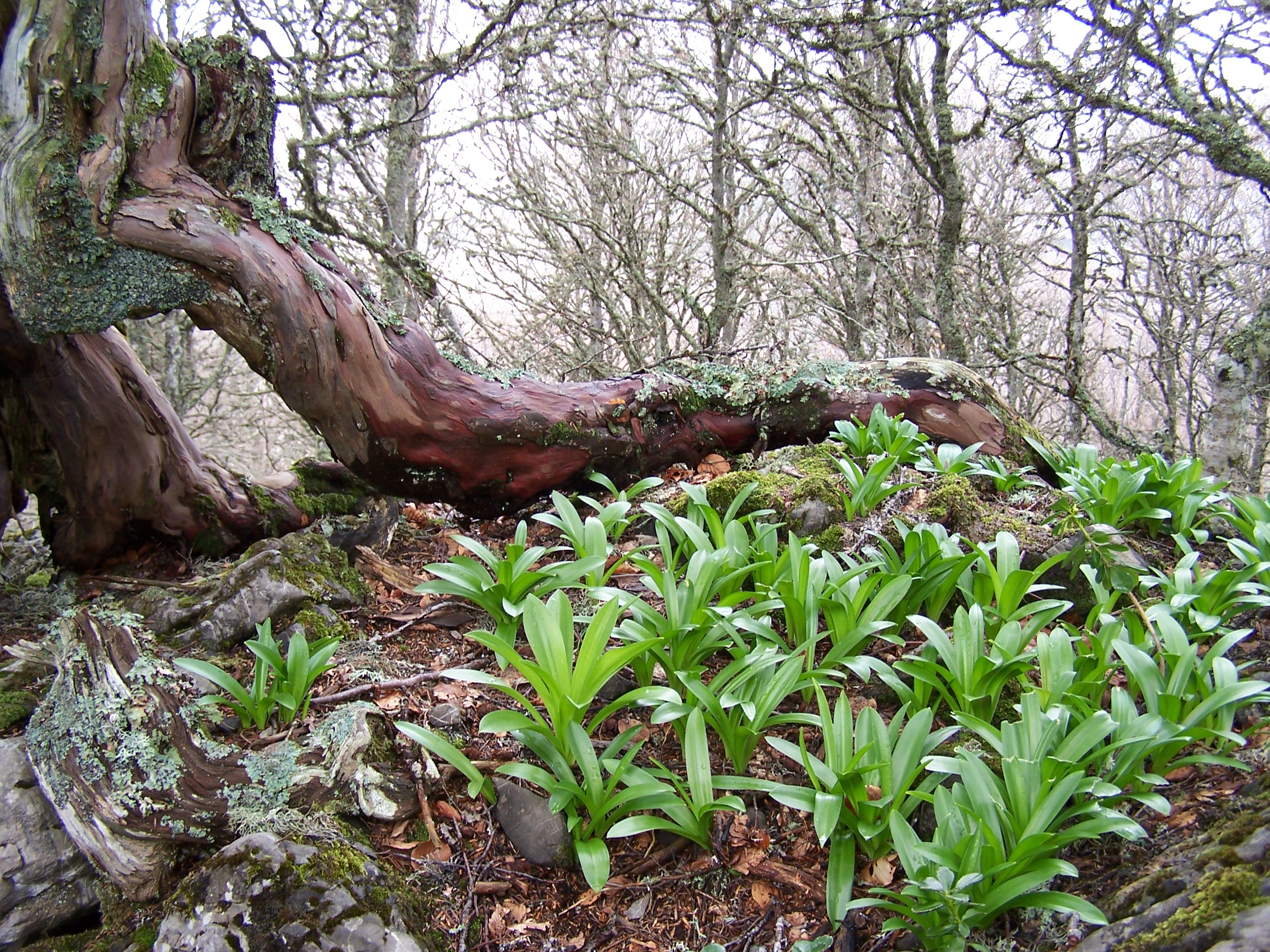 Picos de Europa This is a photography of a Site of Community Importance in Spain with the ID: ES0000003. Natura2000 entry, EEA entry